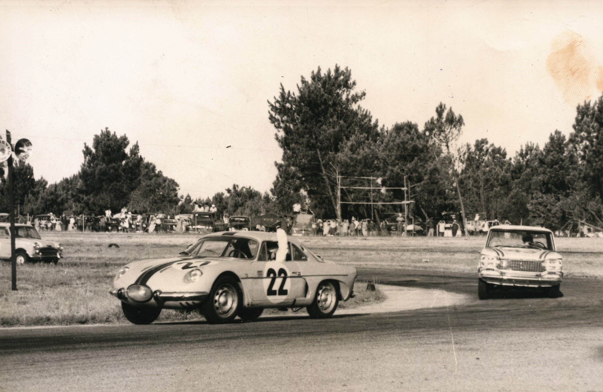 Fotografia do Fundo Correio da Manhã, sob a guarda do Arquivo Nacional.